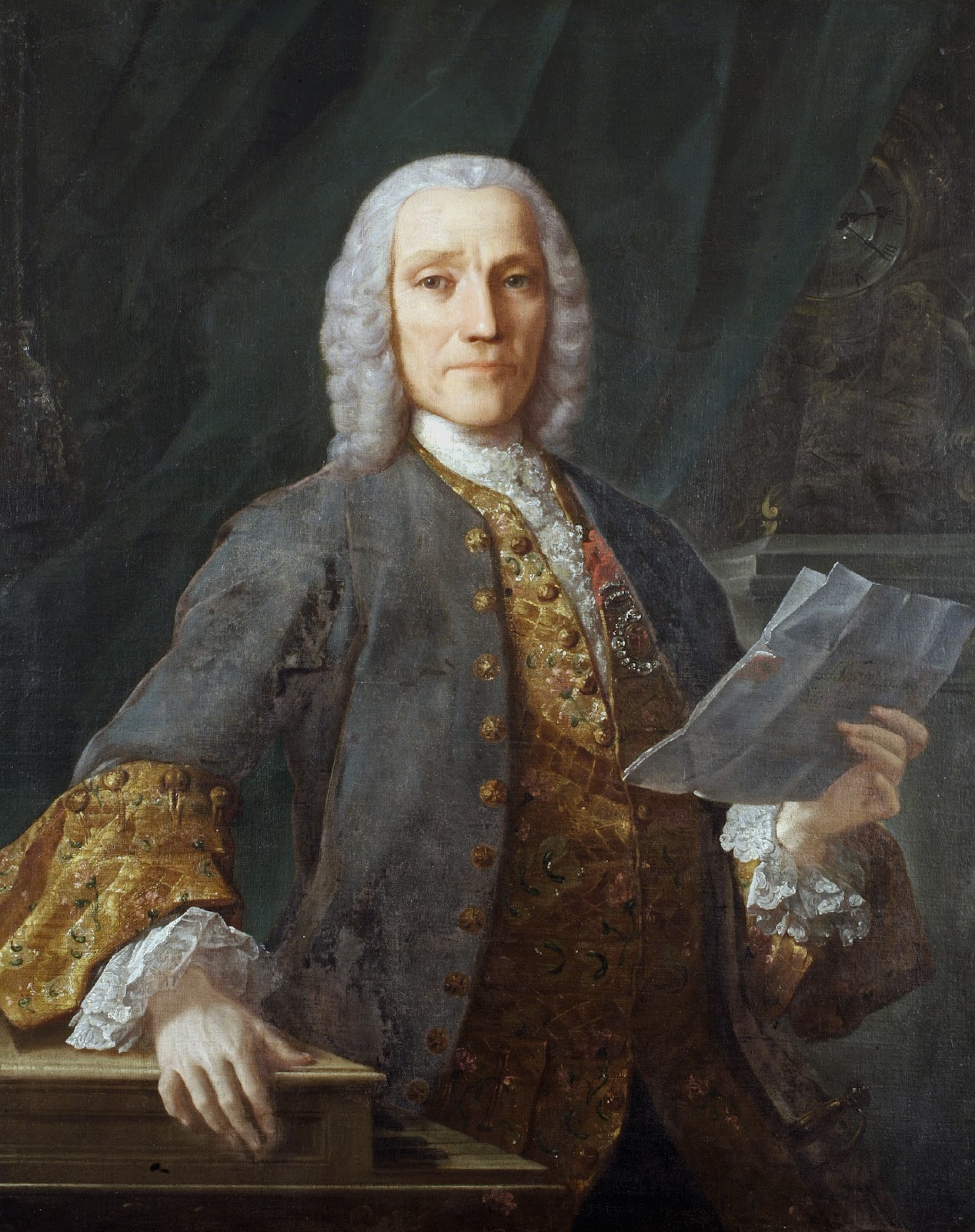 Italian composer